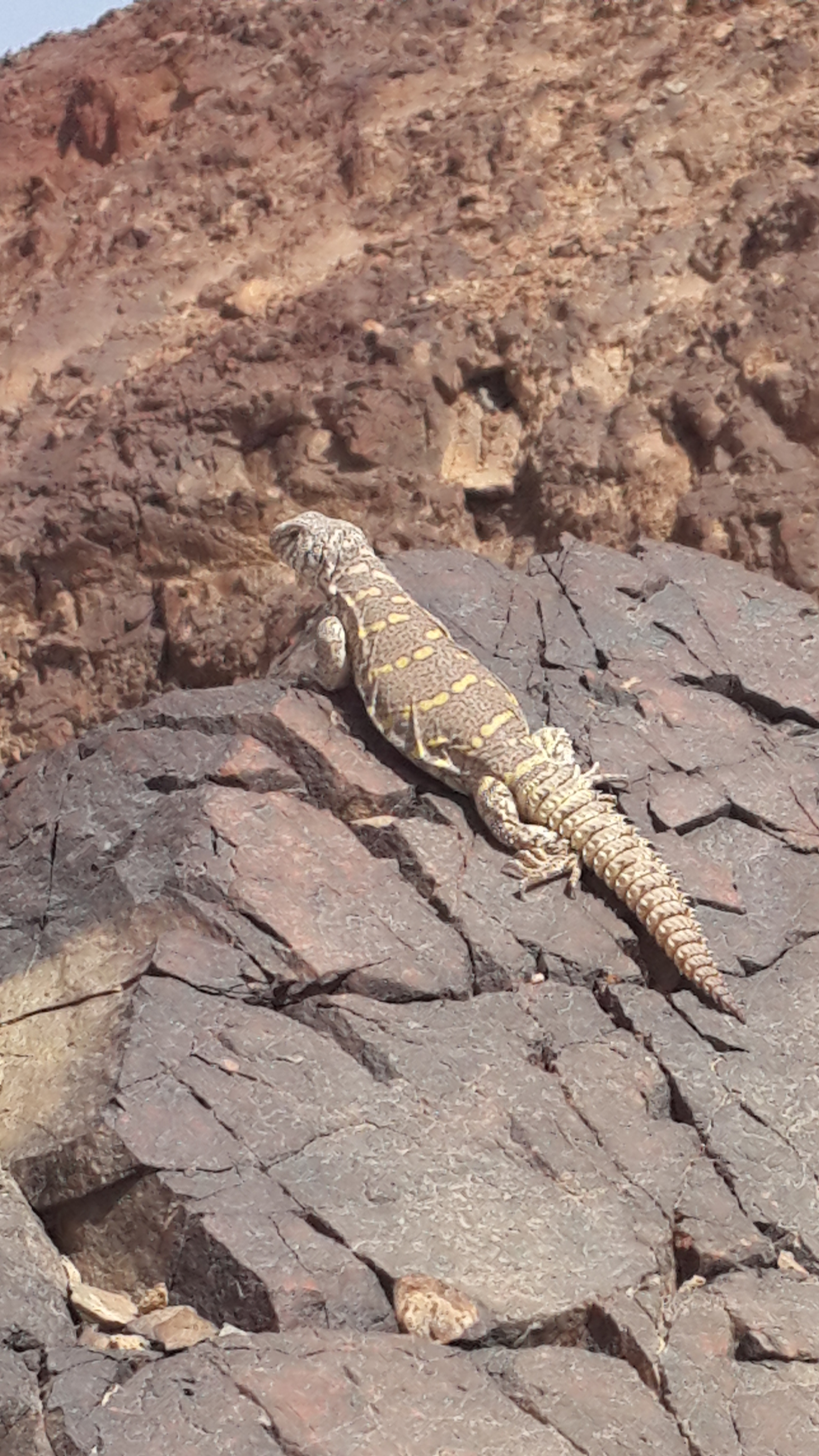 חרדון צב הדור באיזור הרי אילת, צולם במרץ 2015